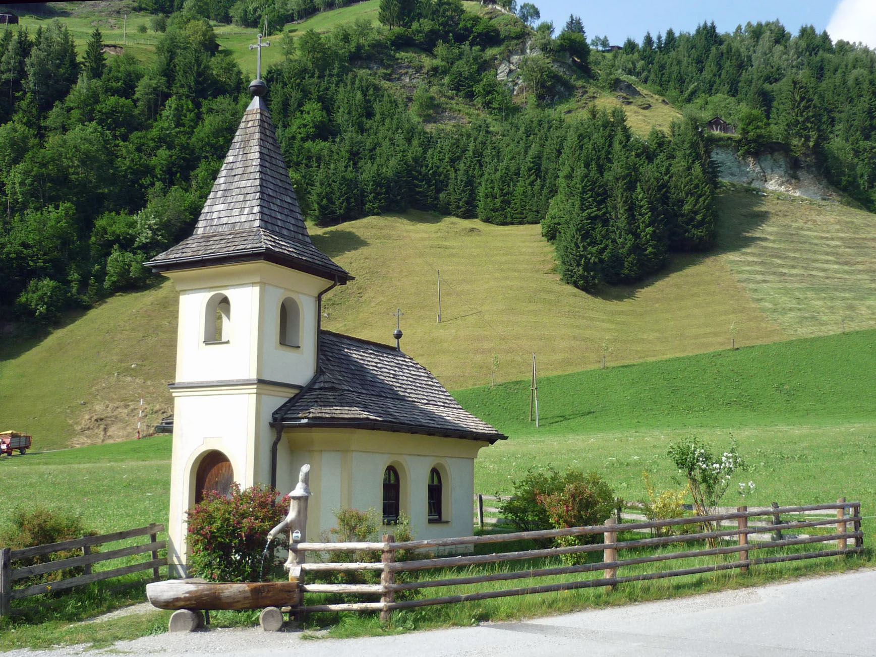 Karteiskapelle im Großarltal